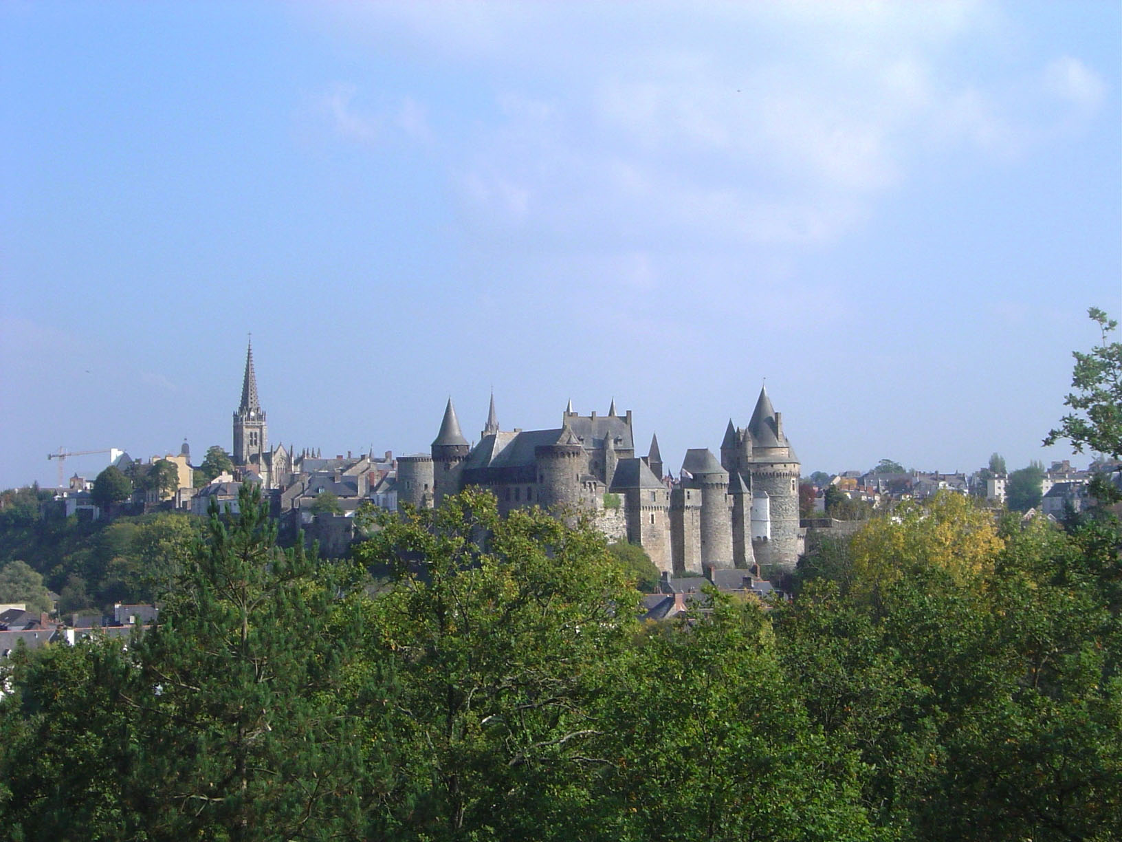 Vue du centre historique de Vitré depuis la colline des Tertres Noirs.